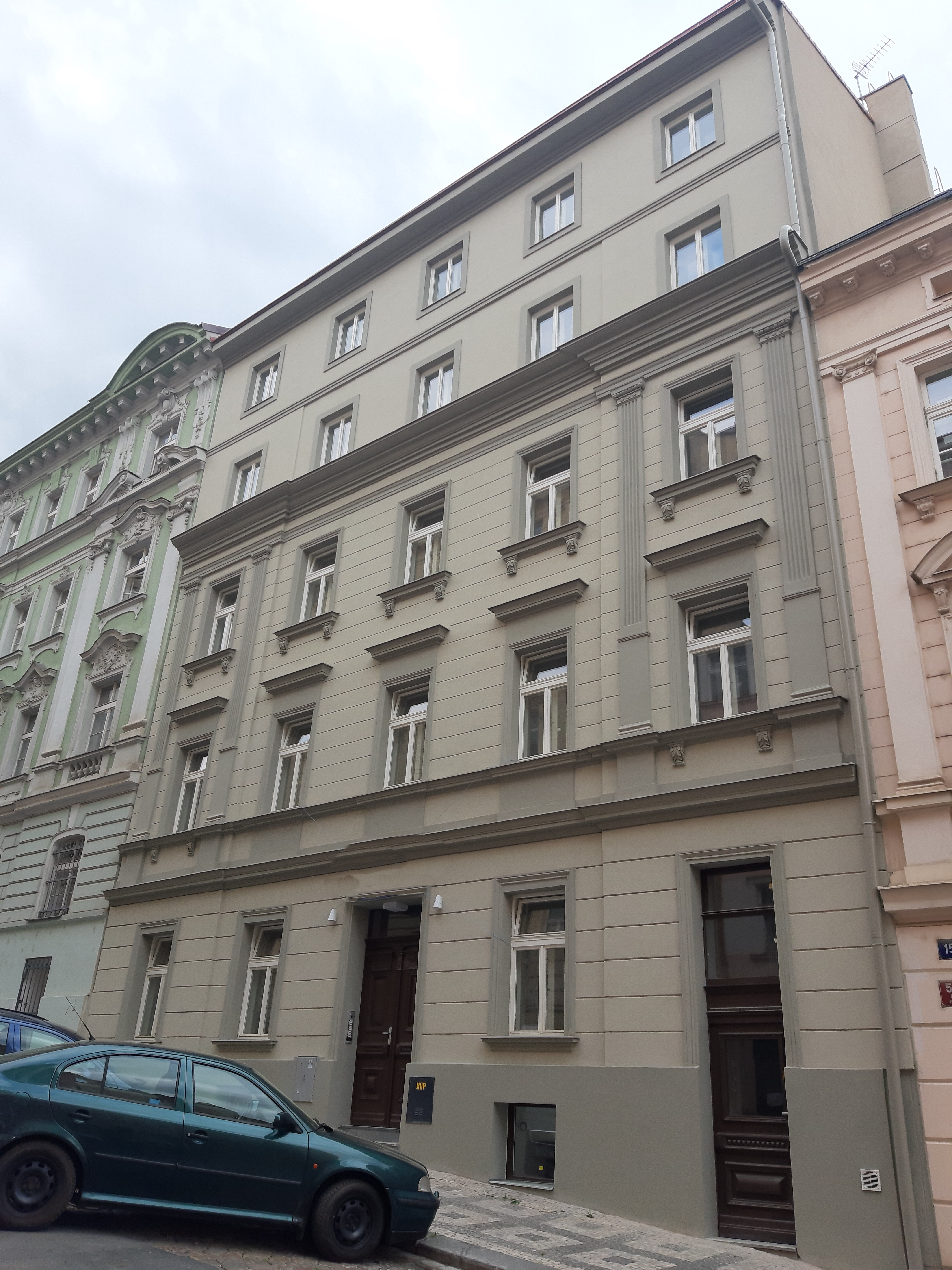 Praha Žižkov, historický dům Vlkova 13